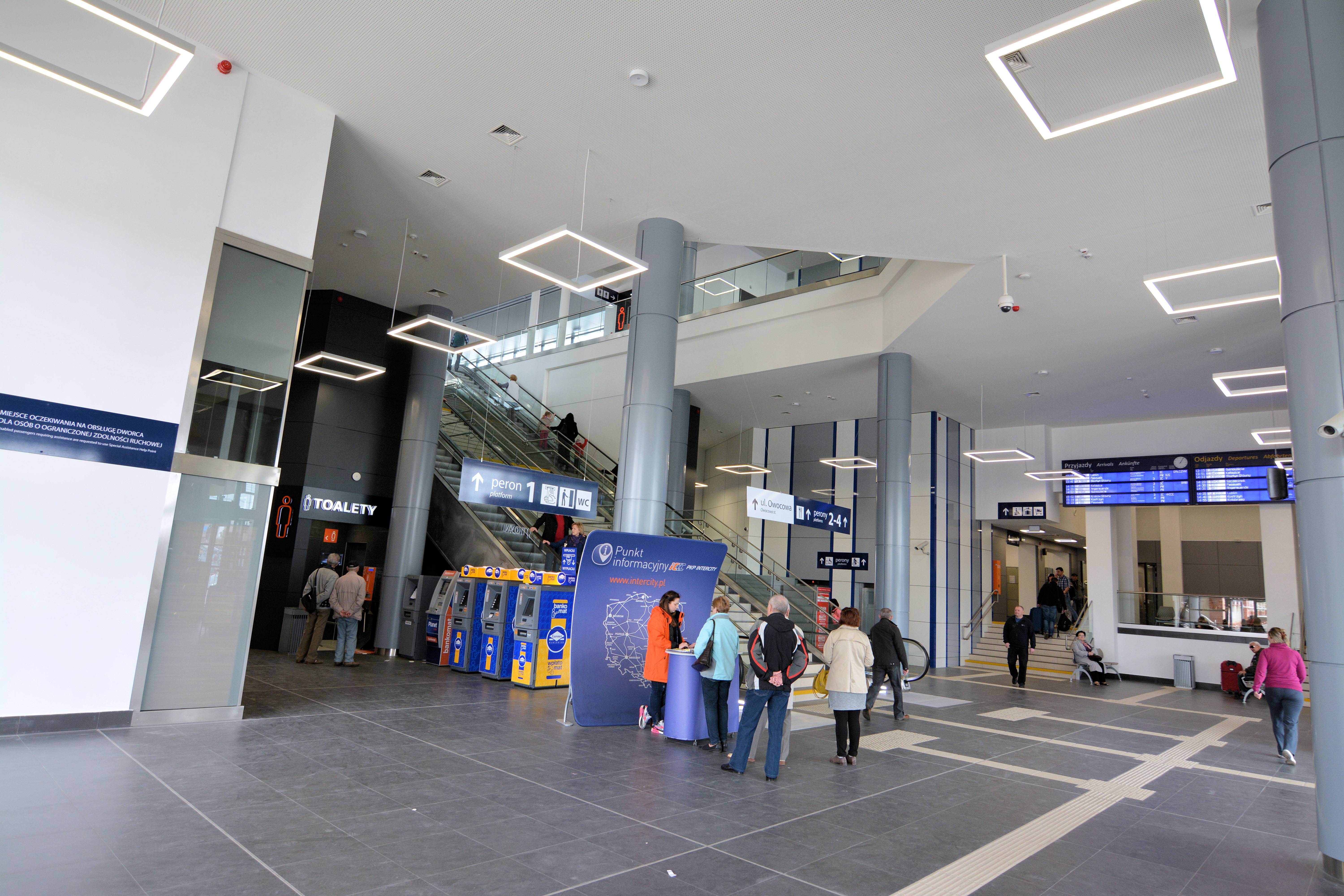 Dworzec kolejowy Szczecin Główny po modernizacji